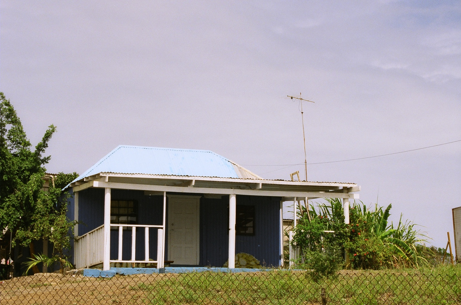 Plankenhuisje.